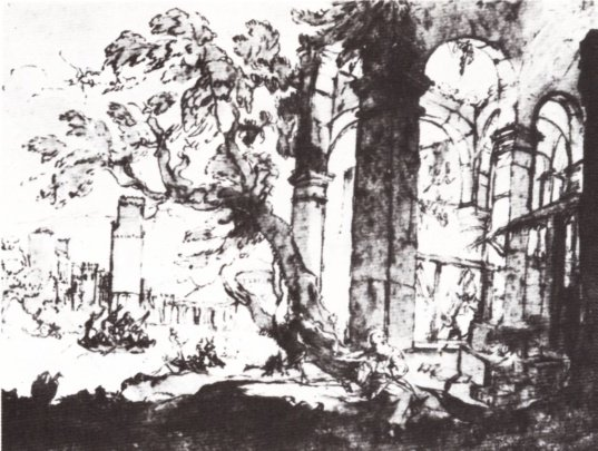 Paisaje con las tentaciones de San Antonio, Claude Lorrain, dibujo en el Liber Veritatis (British Museum).